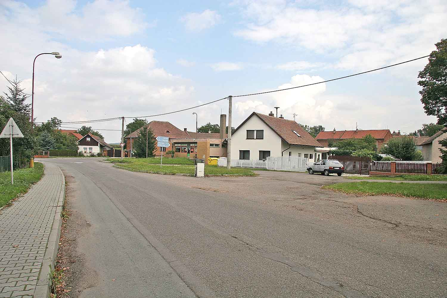 Třesovice, village in Hradec Králové district, Czech Republic Autor:Prazak Date: 26. 8. 2006